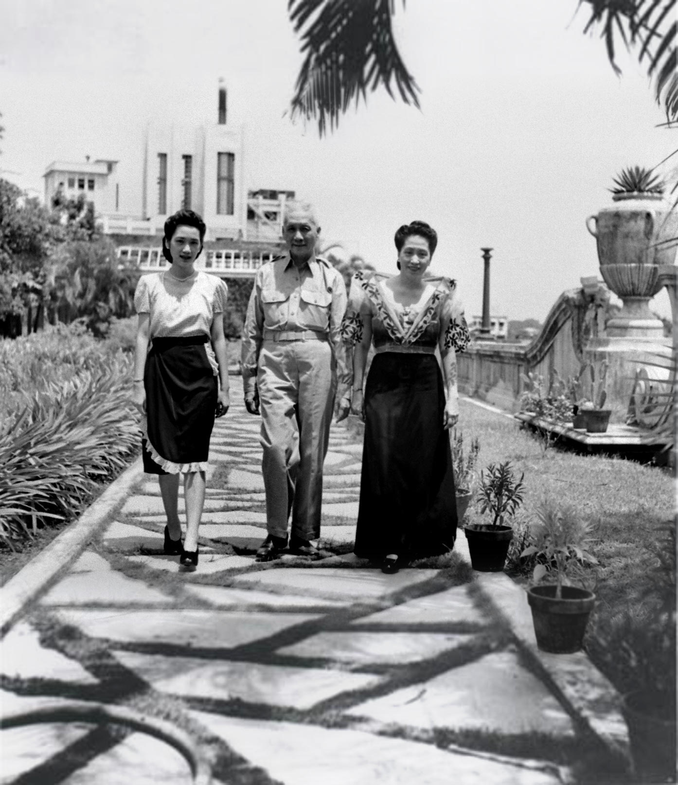 Osmena Family A tMalacanang